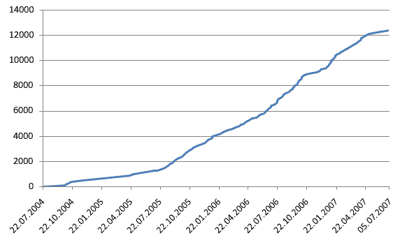 Grafik: Tabelle Statistik des Stadtwiki Karlsruhe